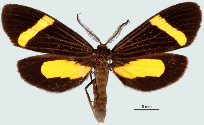 Lyces angulosa ♂ Location: Brazil: Rio Grande do Sul, Pelotas